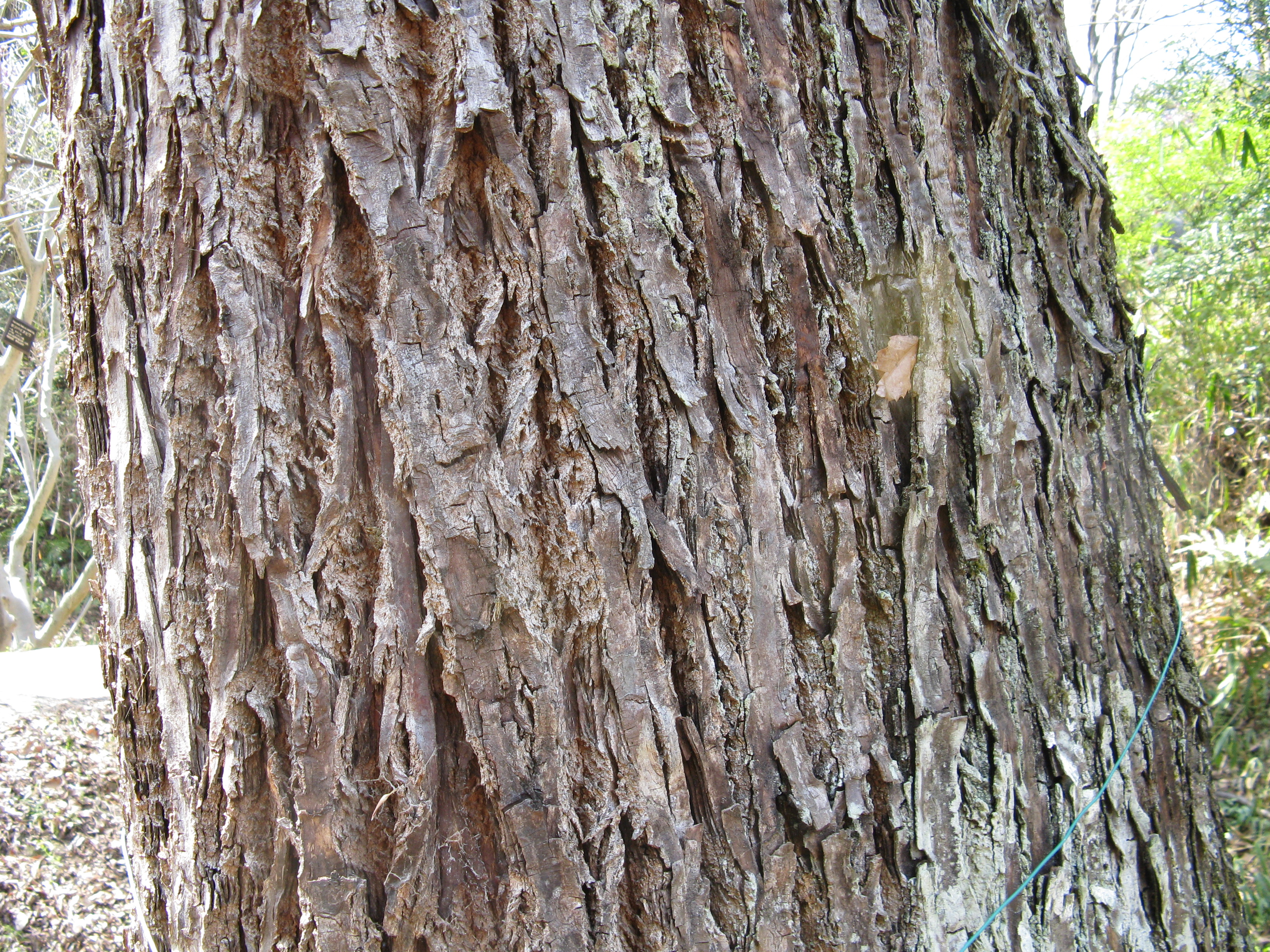 Scientific name Choerospondias axillaris